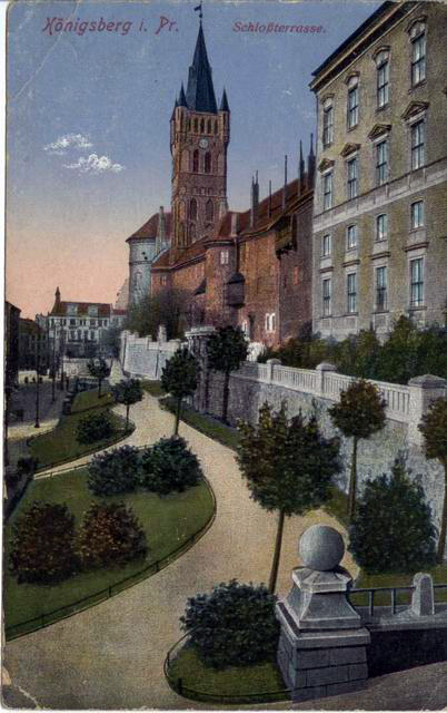 Schloss Süd Ost mit Schlossterrassen